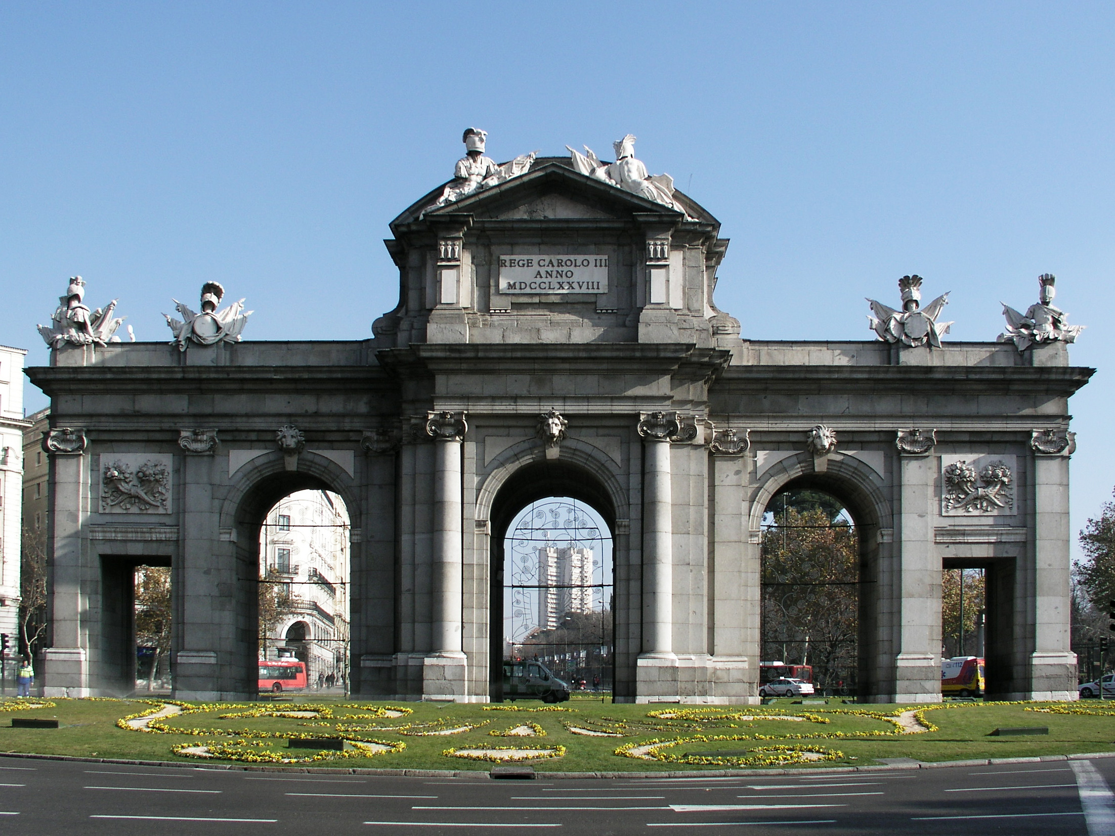 Puerta de Alcalá, Plaza de Independencia, Madrid, Spain. West side